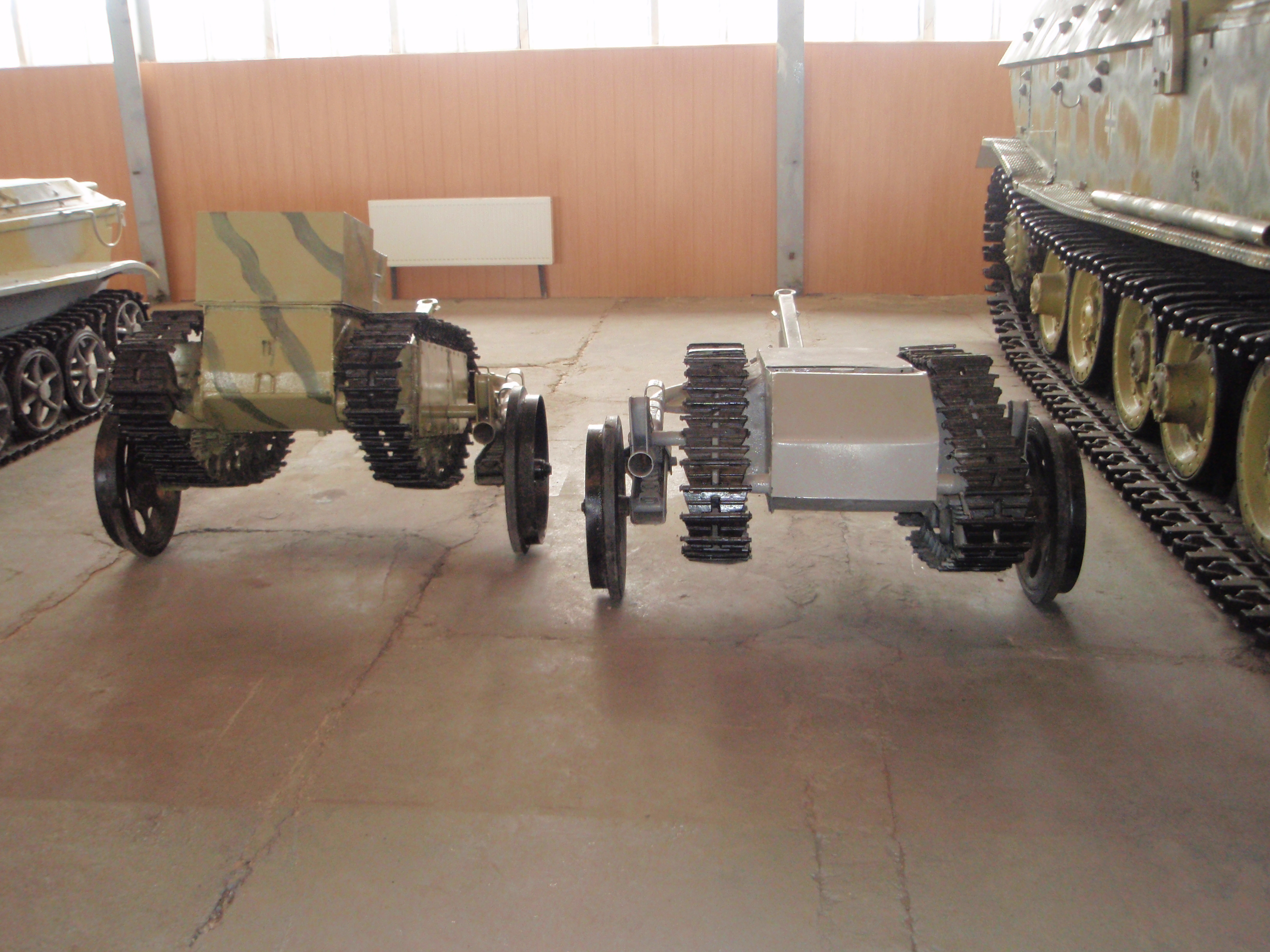 Немецкий лёгкий носитель заряда Goliath в Кубинке